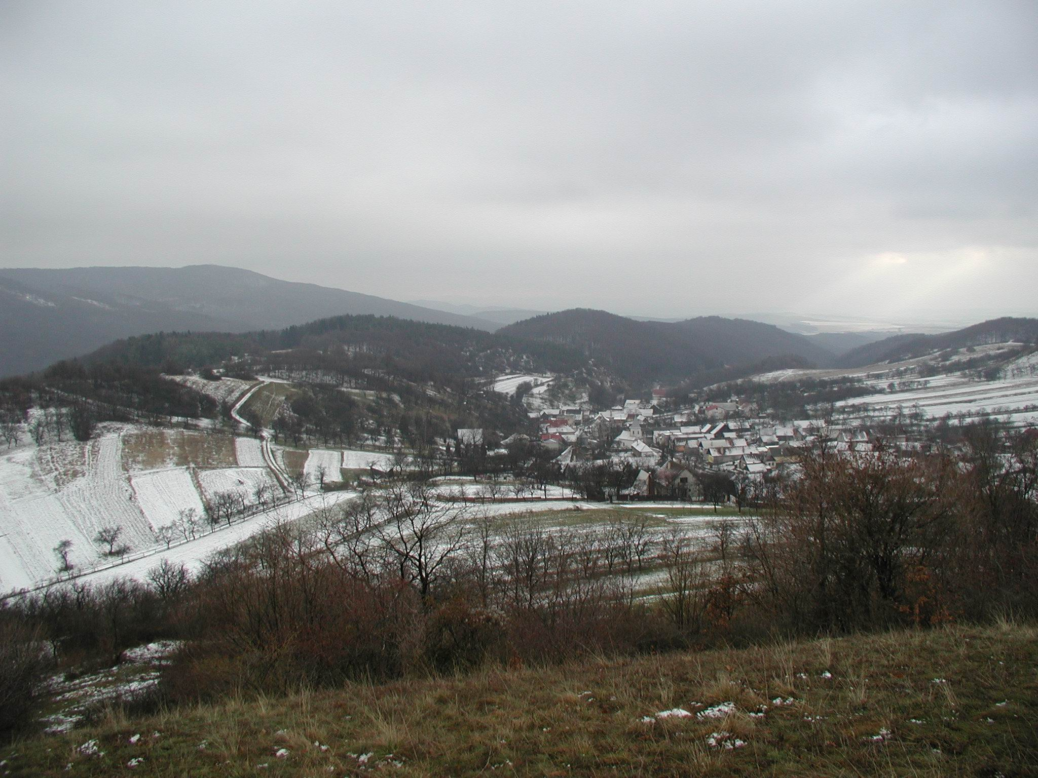 Petrova Lehota - pohľad z Trubárky